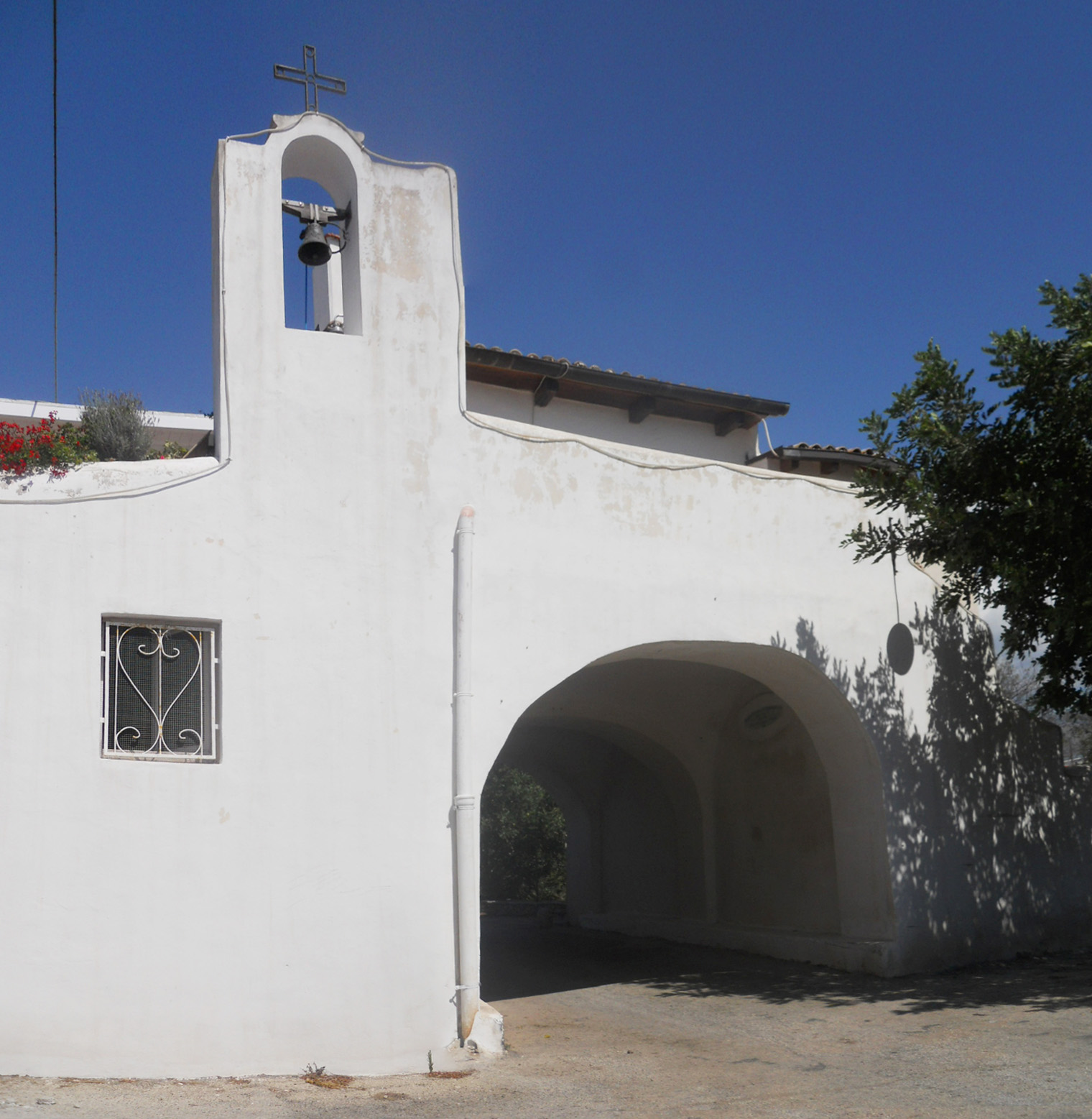 Esterno